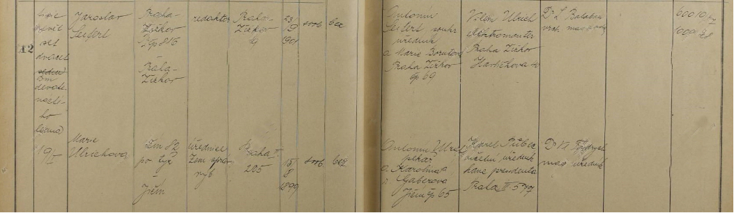 Matrika oddaných - Jaroslav Seifert, svatba